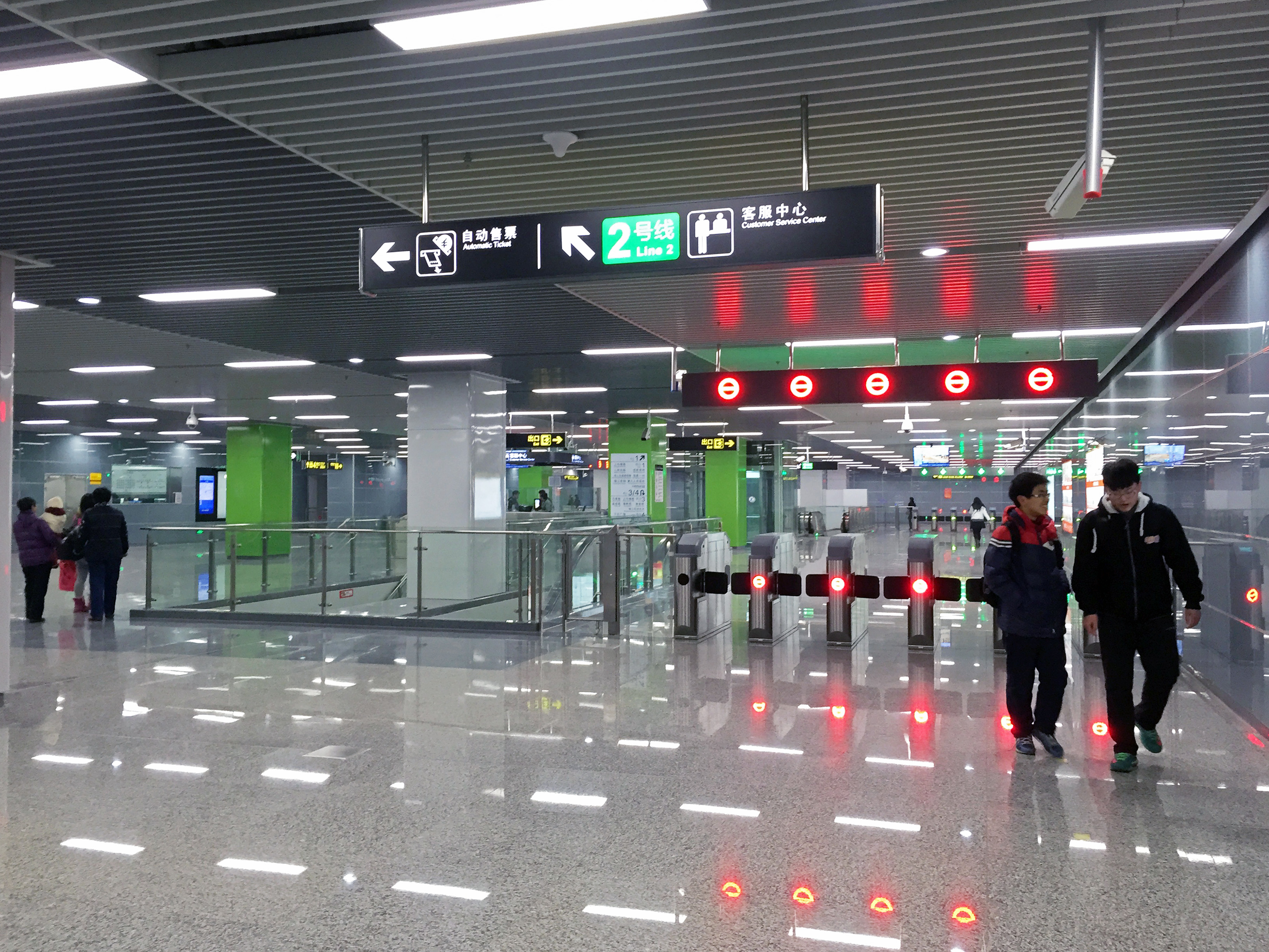 無錫地鐵2號線上馬墩站站廳